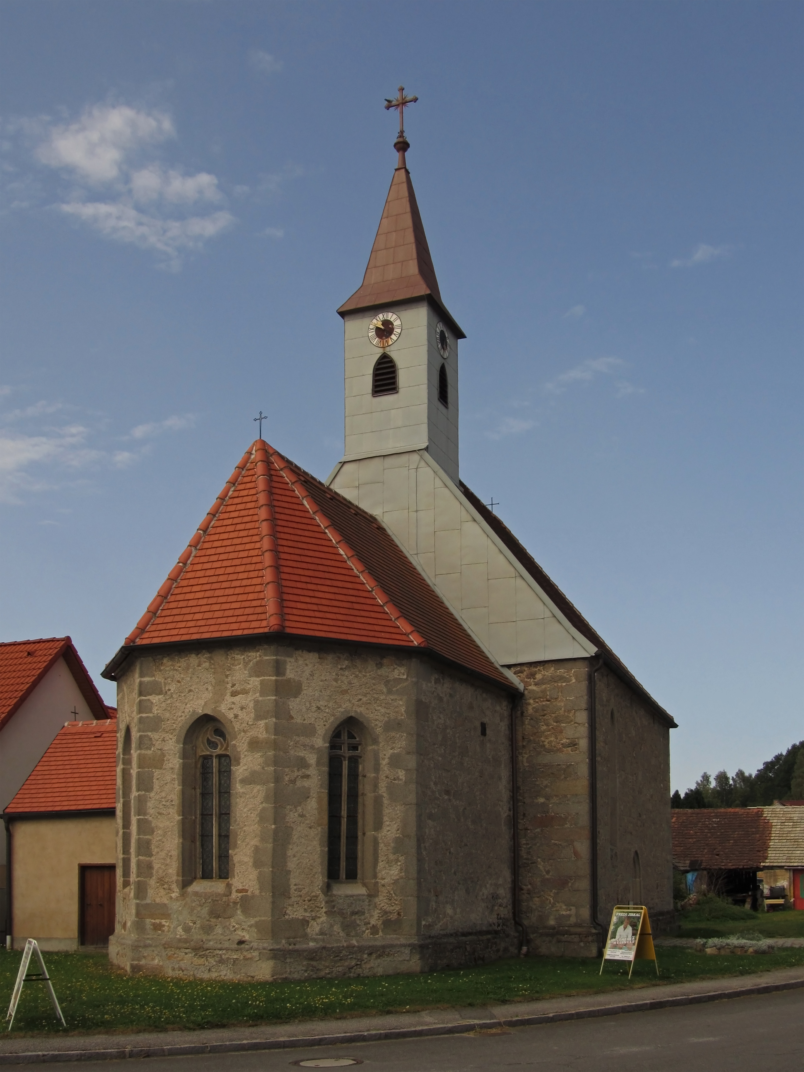 Spätgotische Hallenkirche, um 1400 erbaut